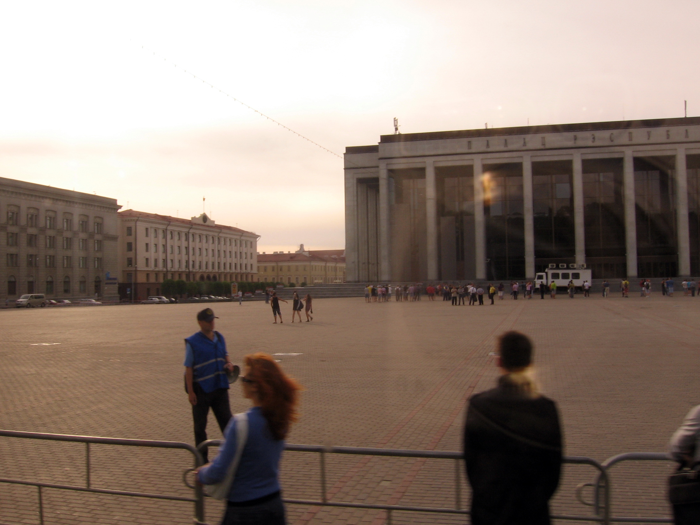 Занятие площади лжеподготовкой к параду на День независимости